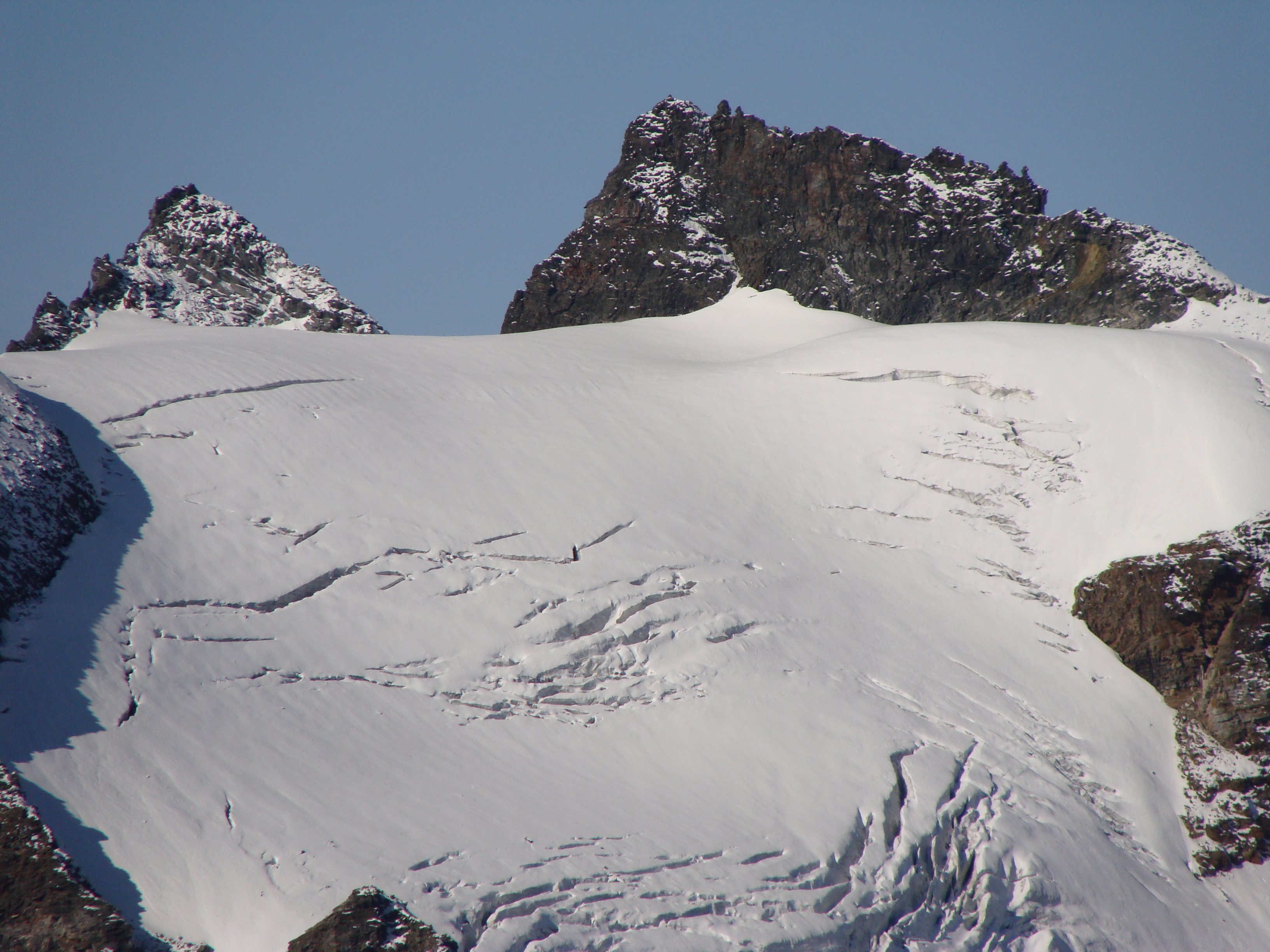 Das Hillehorn mit Hillegletscher